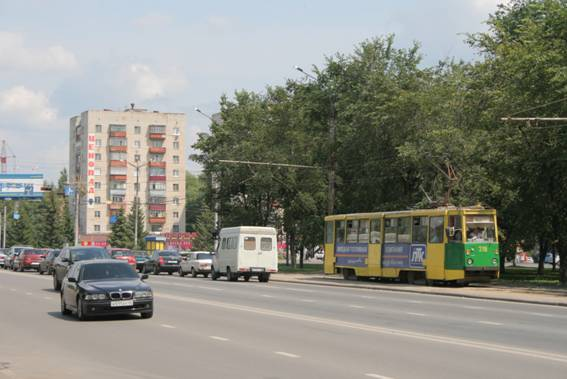 Липецк, Московская улица, трамвай